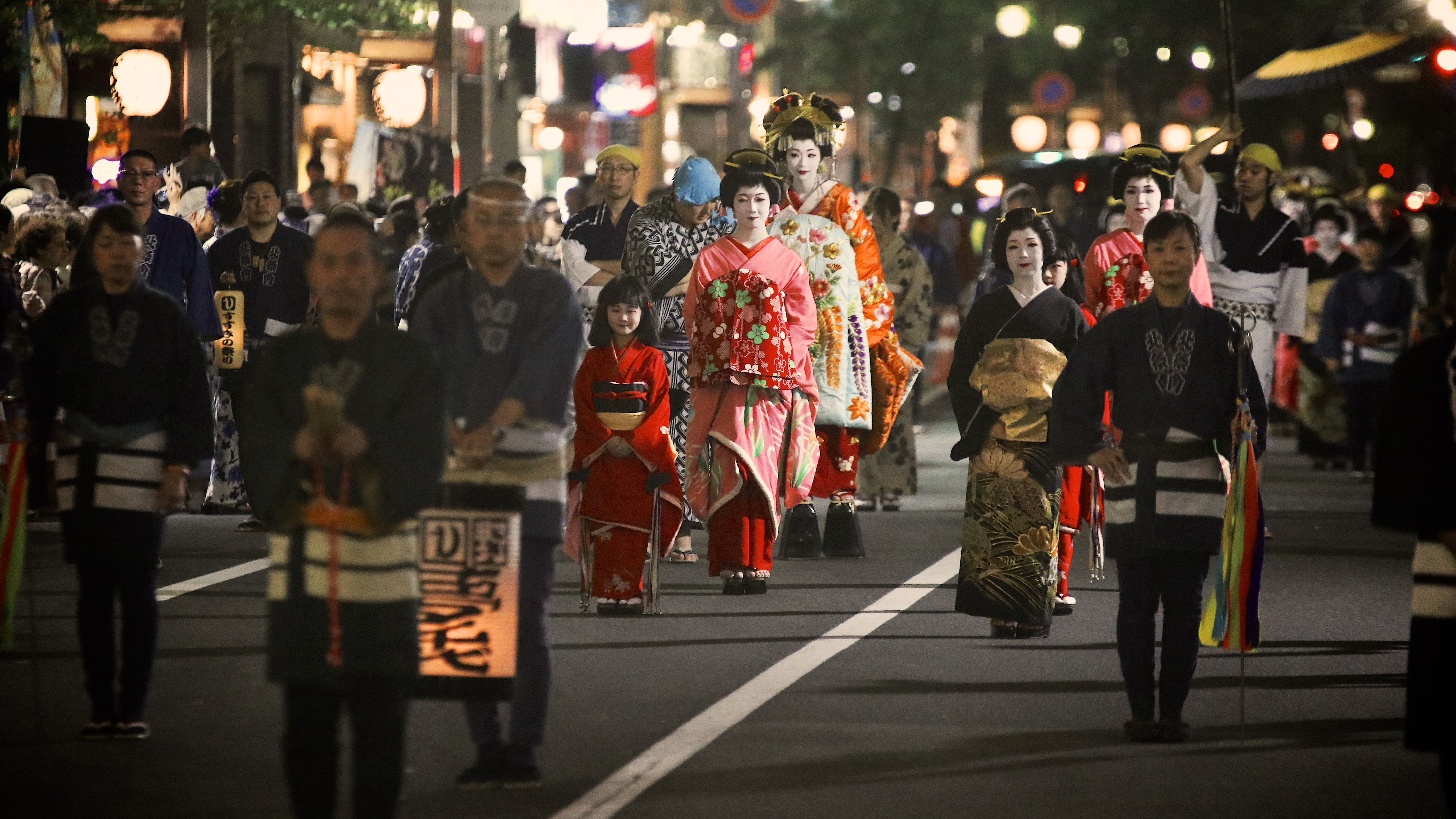 花魁道中@すすきの